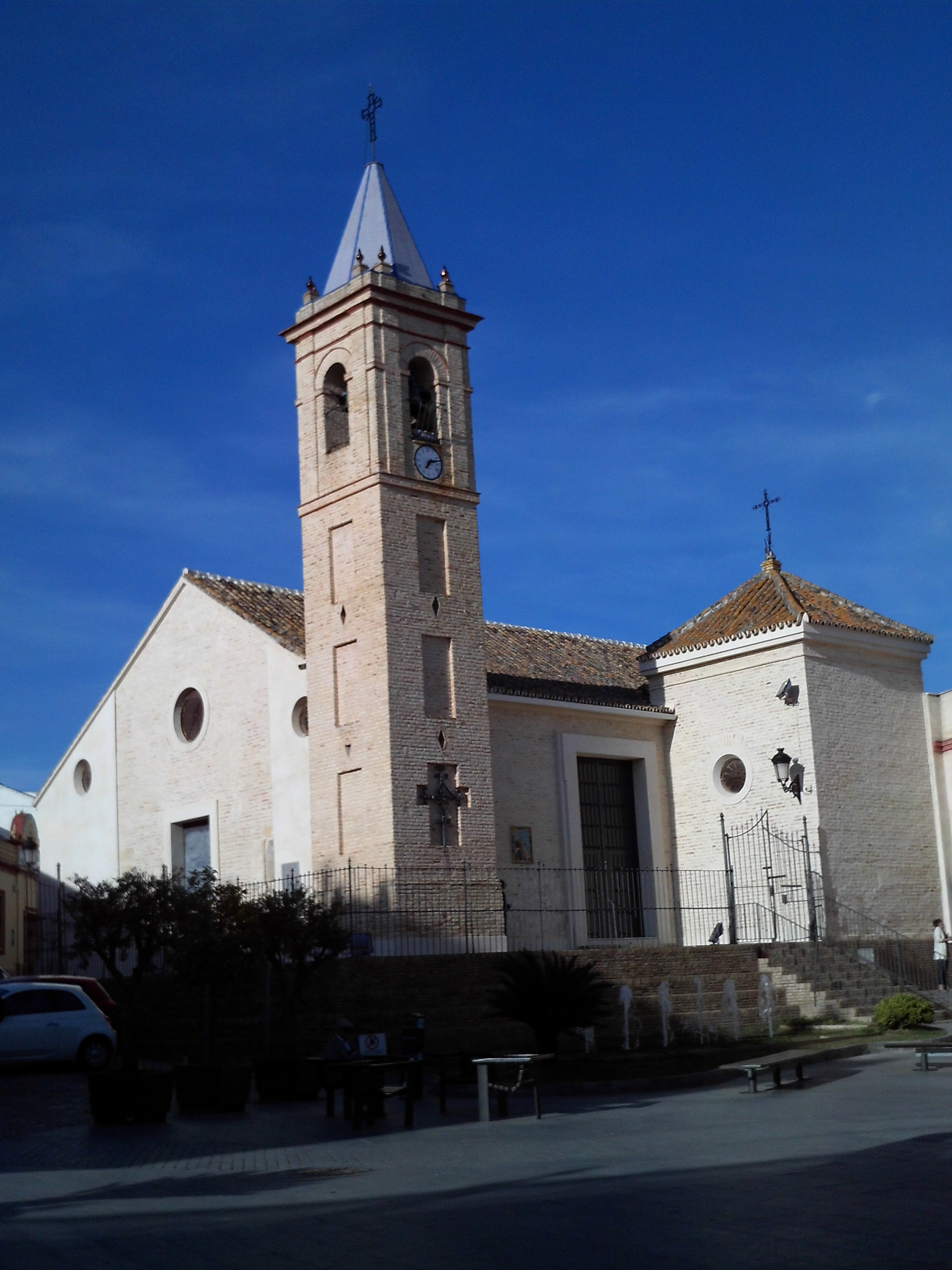 Iglesia de Nuestra Señora de Belén. Gines, provincia de Sevilla, Andalucía, España.